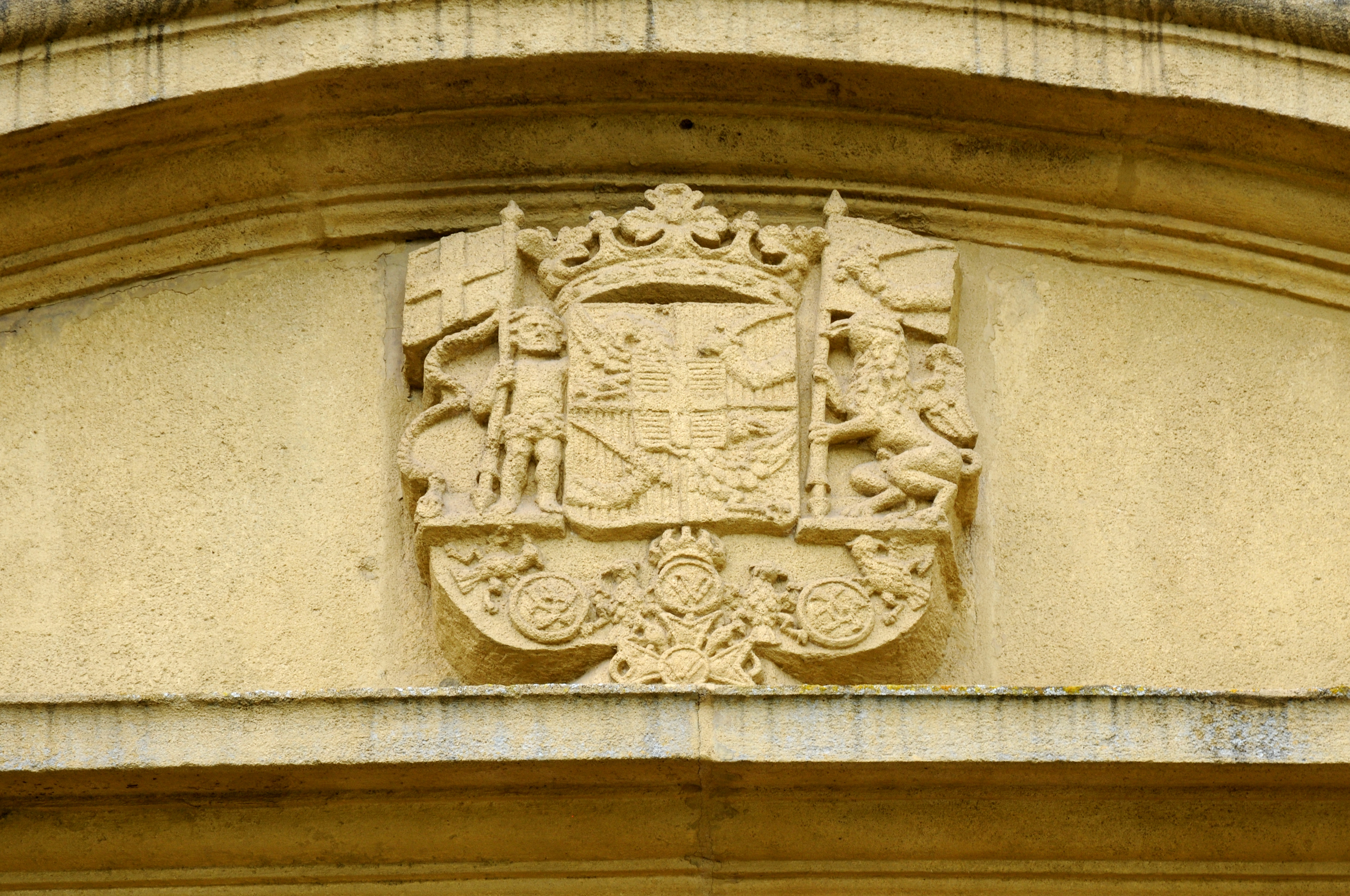 De Wopen iwwer dem Haaptportal vum Suessemer Schlass.